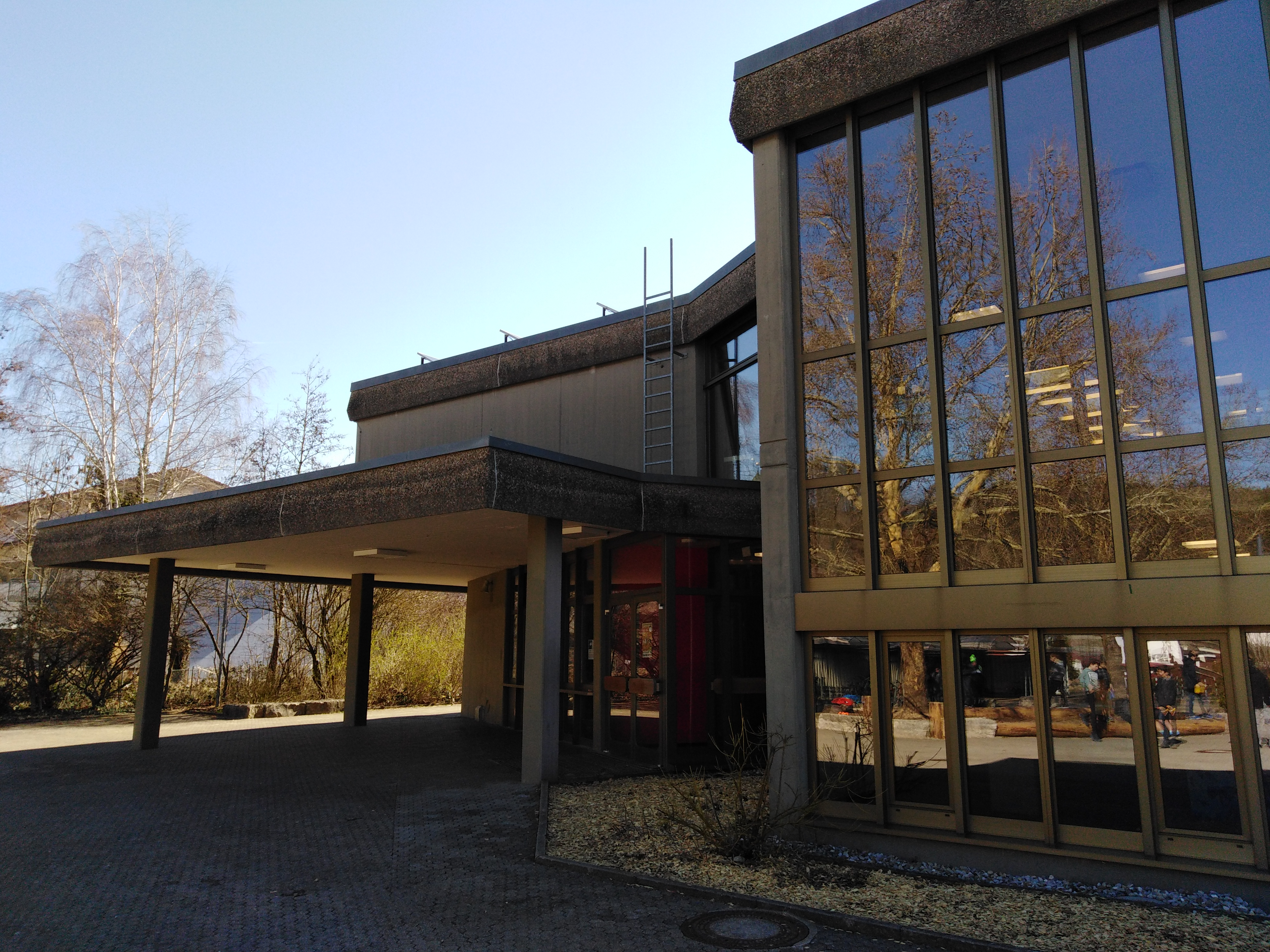 Alemannenschule (ASW) in der Gemeinde Wutöschingen im Landkreis Waldshut in Baden-Württemberg. Das “Blaue Haus” (Eingangsbereich) der Gemeinschaftsschule.